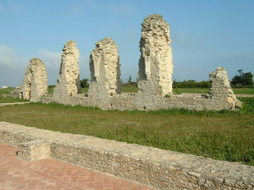 Abbaye Notre Dame de Ré dite des Châteliers : vestiges du réfectoire (La Flotte, Ile de Ré, Charente Maritime, France)